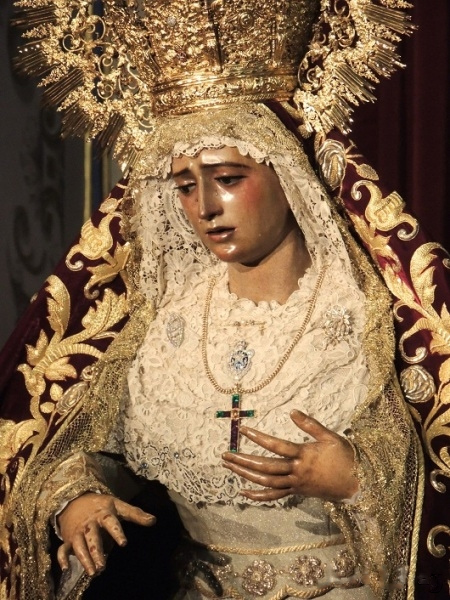 María Santísima de la Amargura Coronada (siglo XVIII) Anónimo. Iglesia de san Juan Bautista, vulgo de "la Palma". Sevilla.